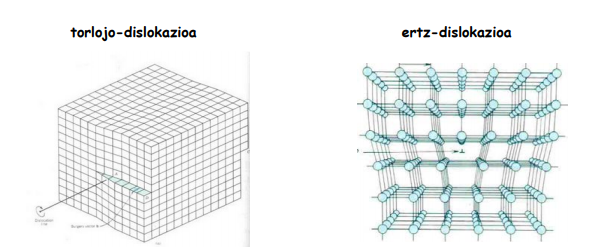 Torlojo eta ertz-dislokazioa